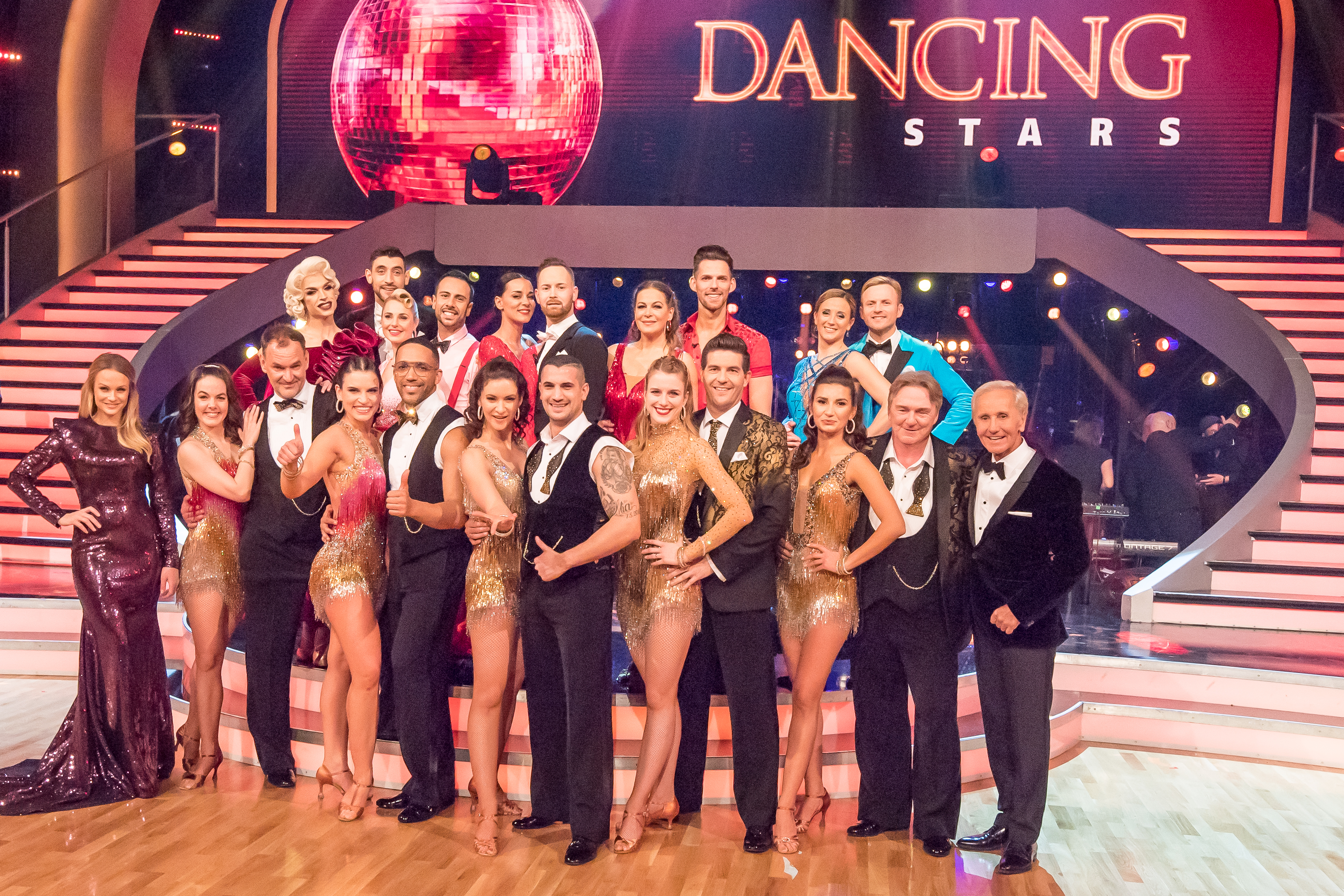 Wien, 06. März 2020: ORF Dancing Stars, 1. Folge - Bild zeigt alle Teilnehmer. 1. Reihe v.l. Mirjam Weichselbraun, Christian Dolezal, Roswitha Wieland, Conny Kreuter, César Sampson, Alexandra Scheriau, Marcos Nader, Catharina Malek, Norbert Oberhauser, Vesela Dimova, Andreas Ogris und Klaus Eberhartinger; 2. Reihe v.l. Tamara Mascara, Dimitar Stefanin, Silvia Schneider, Danilo Campisi, Edita Malovčić, Florian Vana, Natalia Ushakova, Stefan Herzog, Michaela Kirchgasser und Willi Gabalier